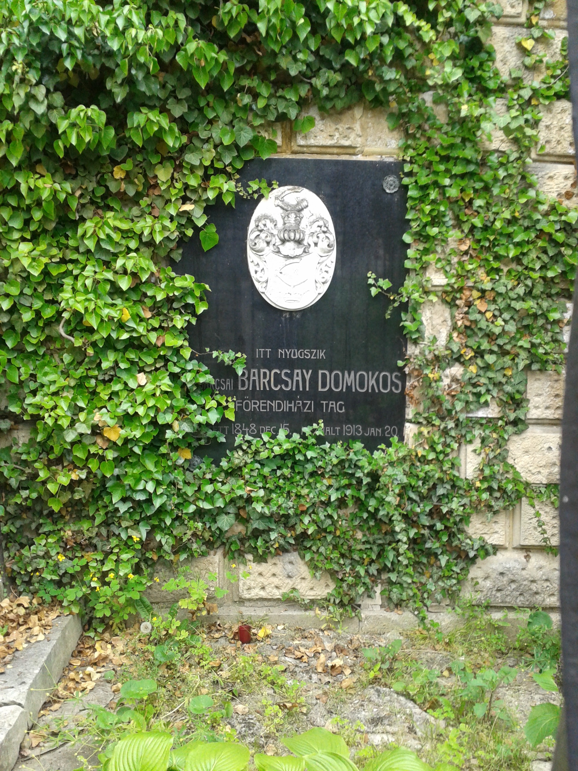 Cimitirul Central "Hajongard" Cluj Napoca Mormântul lui Barcsay Domokos.